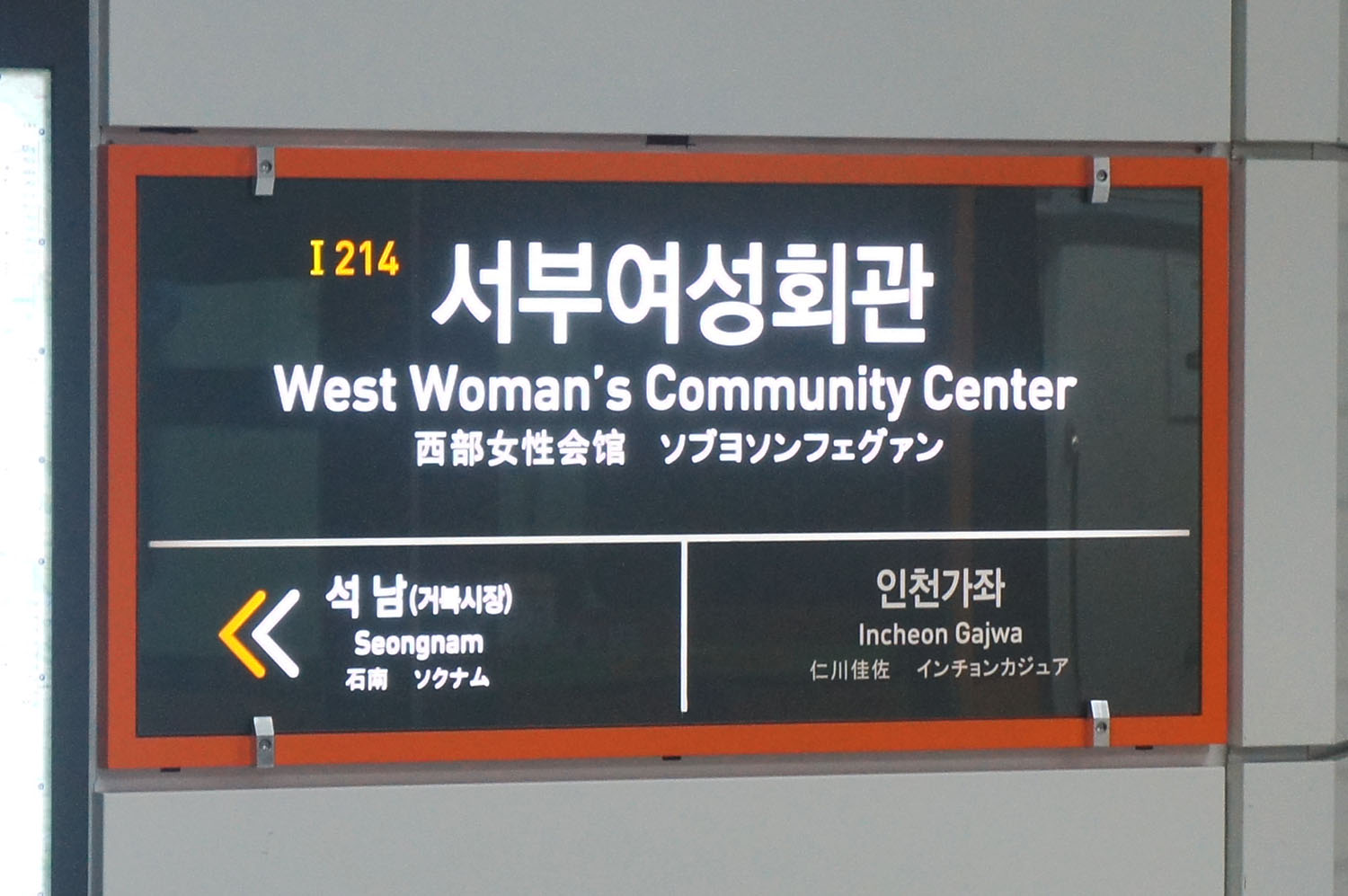 서부여성회관역 역명판